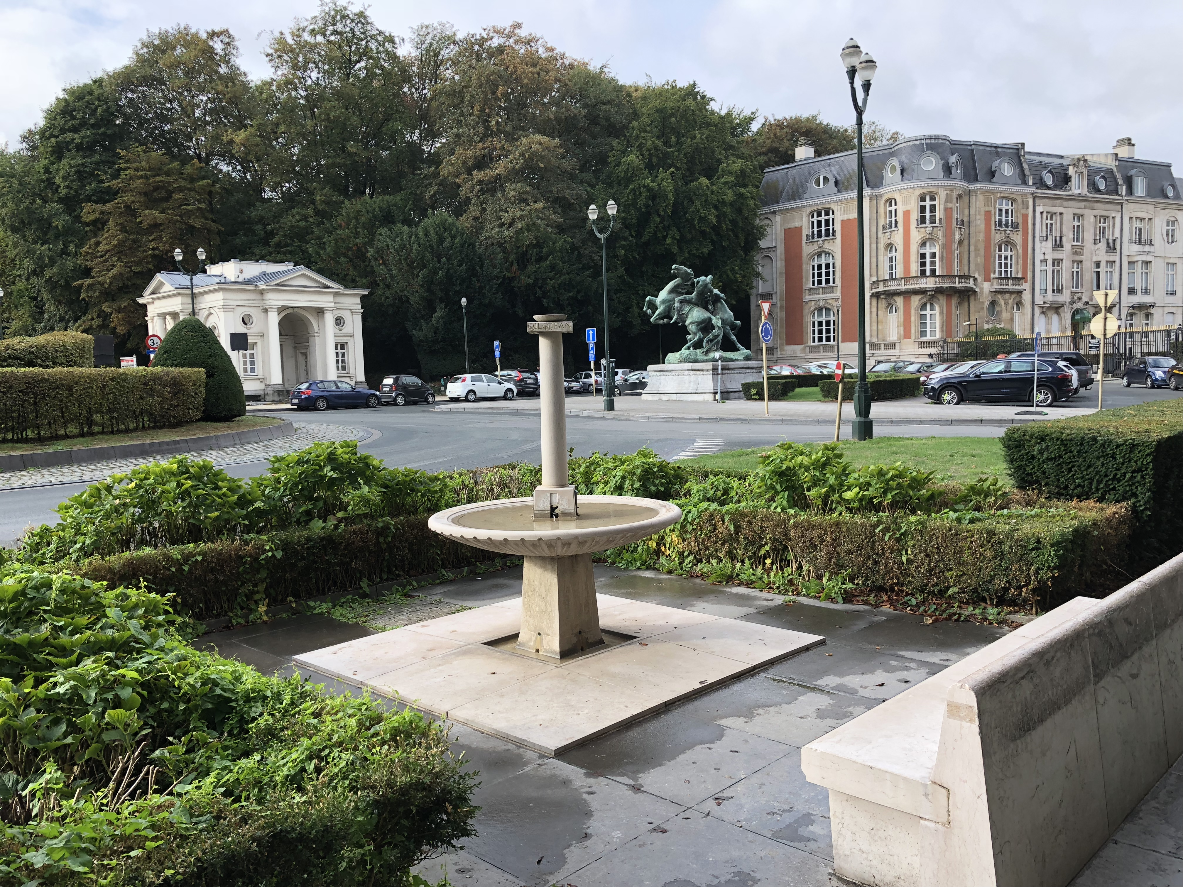 Monument Odilon-Jean Périer, pavillon d’octroi et square du Bois